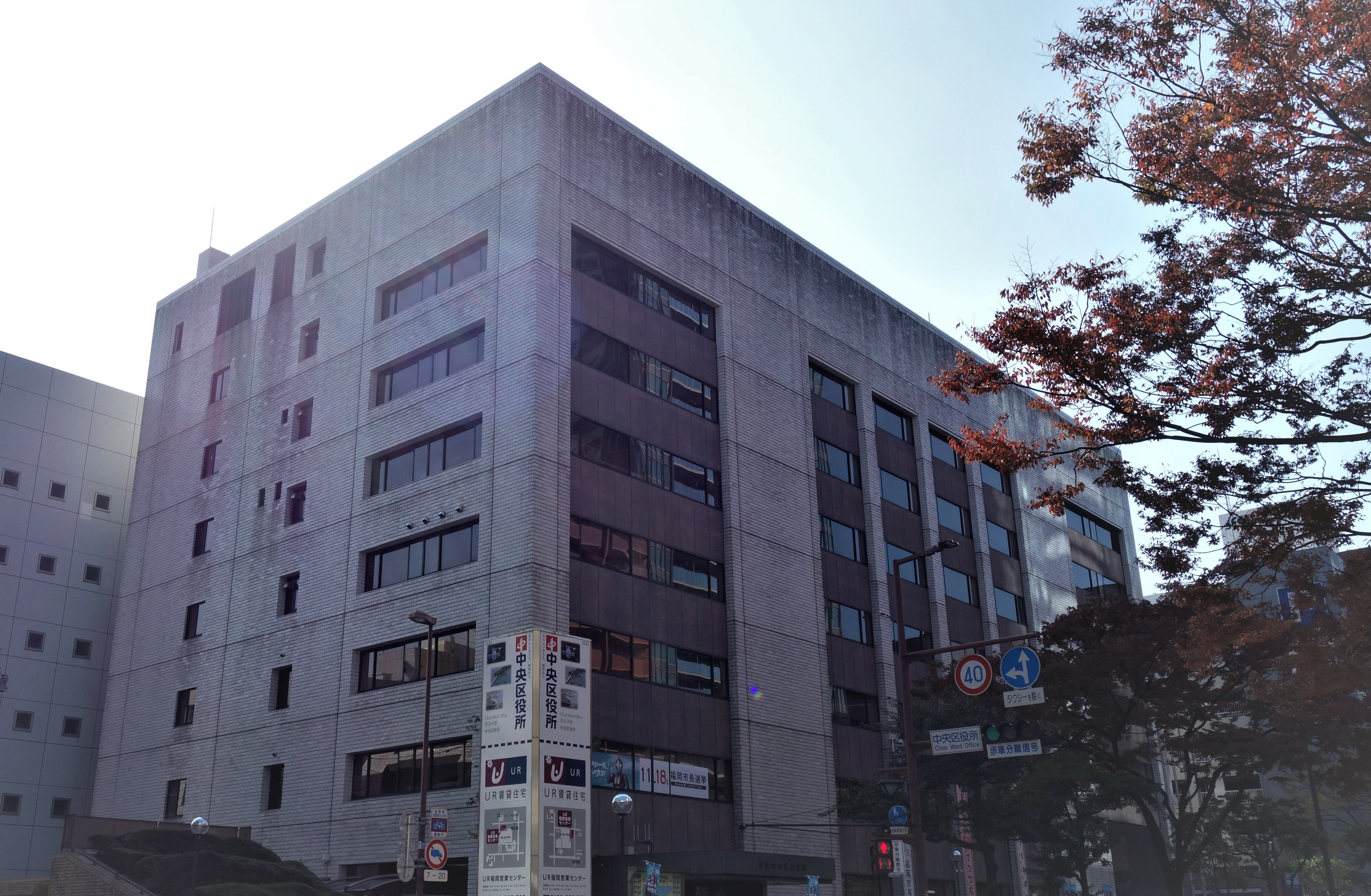 福岡市 中央区役所